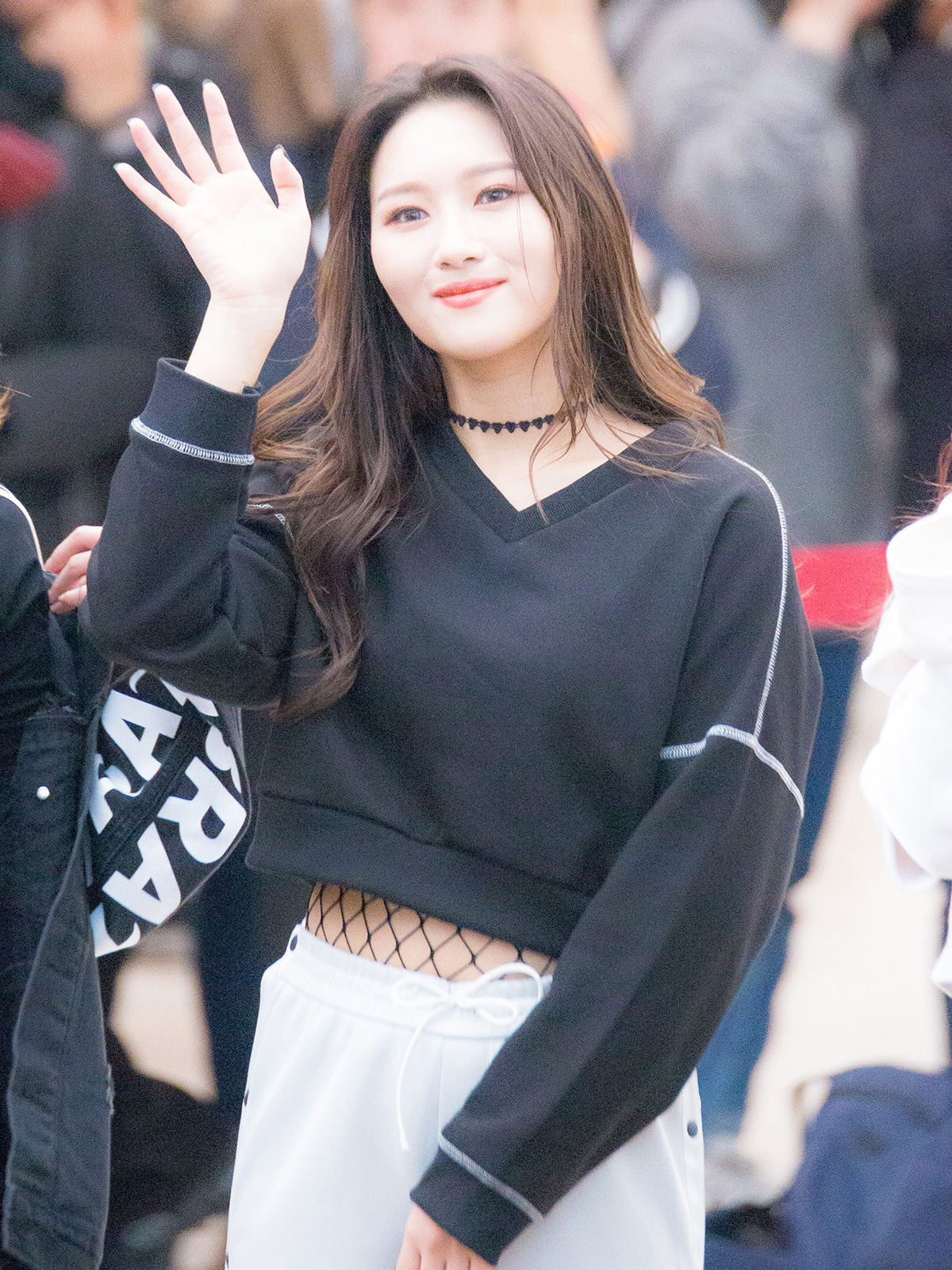 20180210 드림캐쳐 코엑스 게릴라 공연